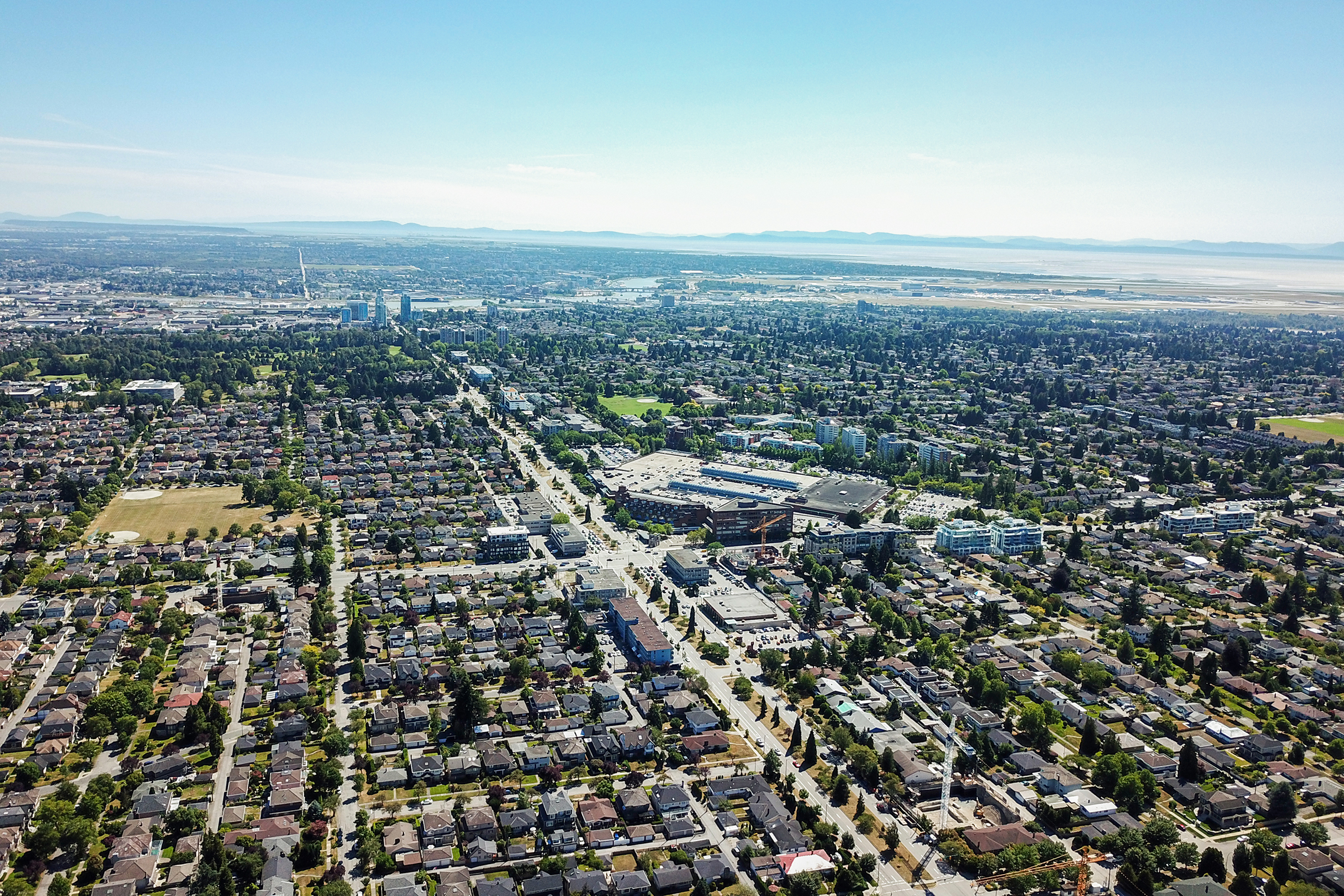 Oakridge, Vancouver BC